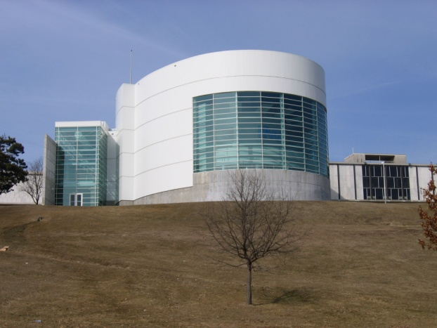 Putnam Museum and IMAX